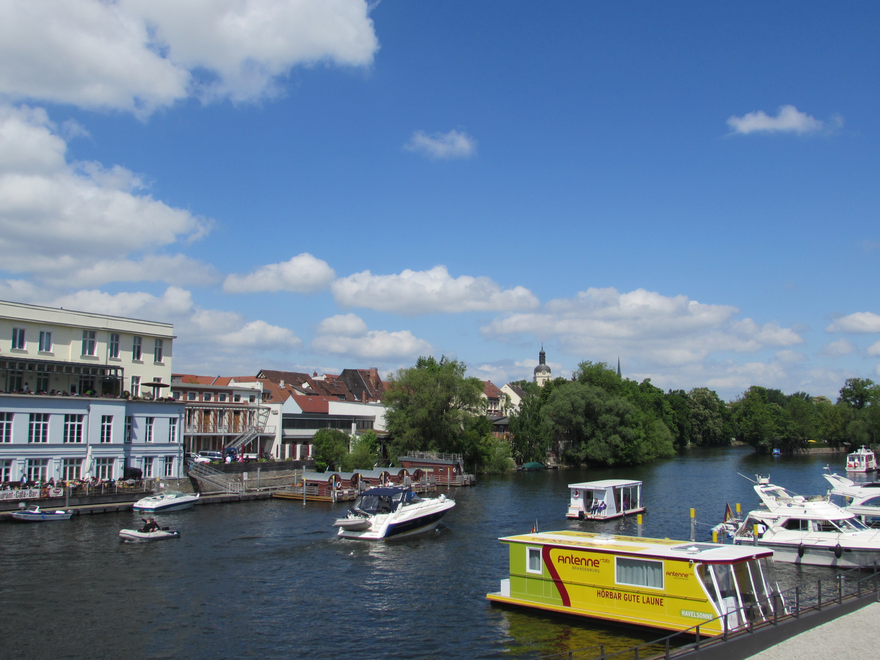 blick auf und über die havel zum nordufer und zur altstadt brandenburg